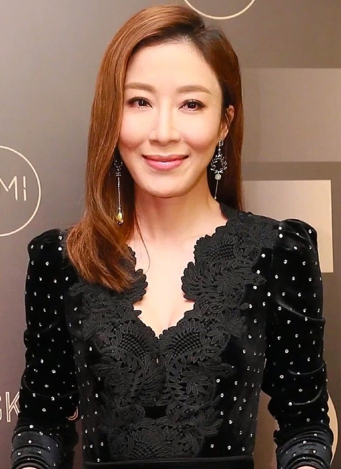 中文（香港）: 2012年萬千星輝頒獎典禮最佳女主角